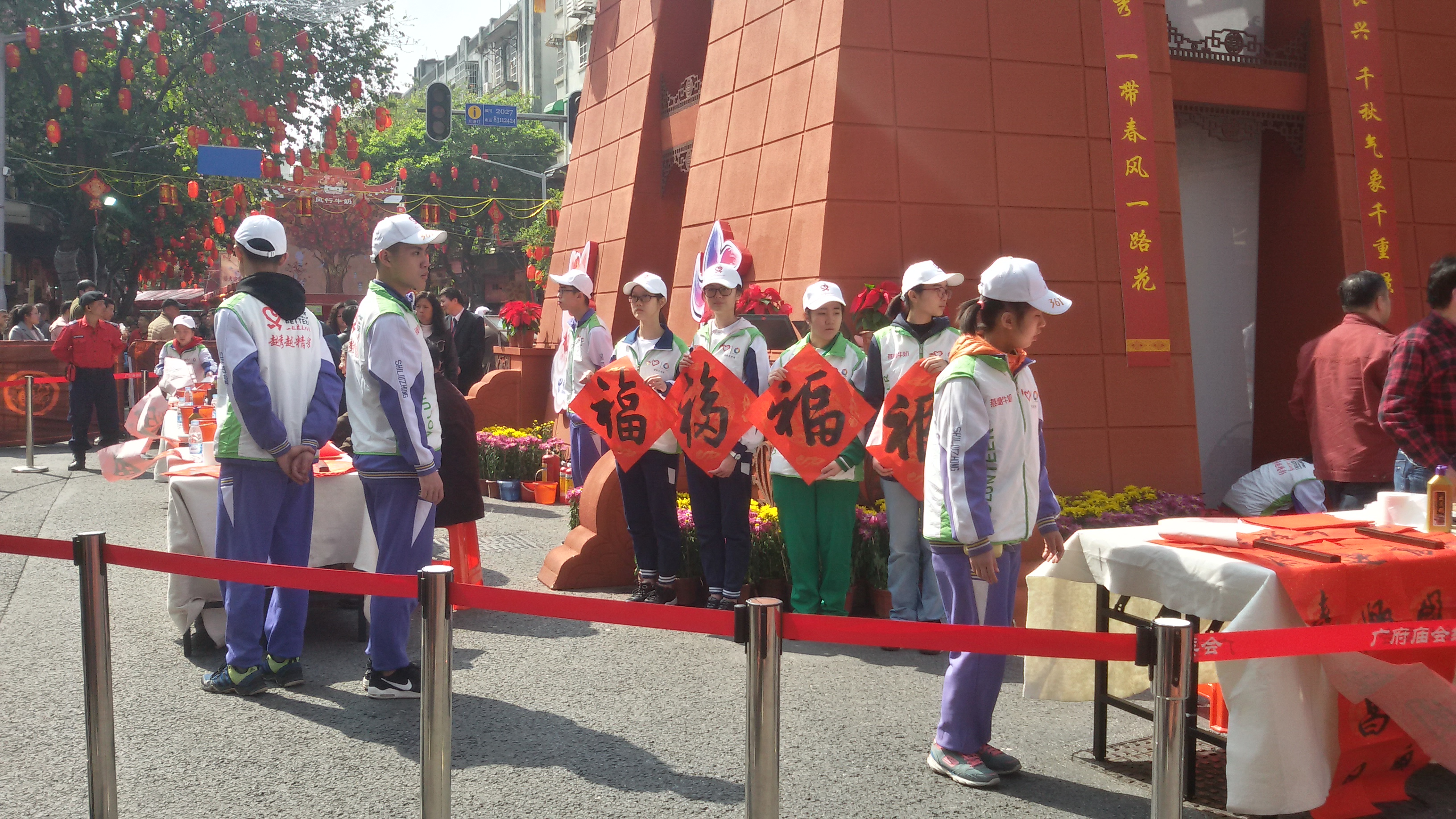 粵語: 越秀西湖花市（2018年）